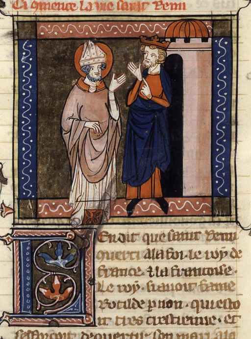 Saint Remy et Clovis Ier. Cote : Français 241 , Fol. 266v. Jacobus de Voragine, Legenda aurea (traduction de Jean de Vignay), France, Paris, XIVe siècle, Richard de Montbaston.